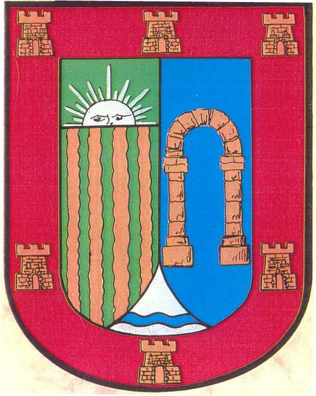 Escudo_Villegas_Villamoron